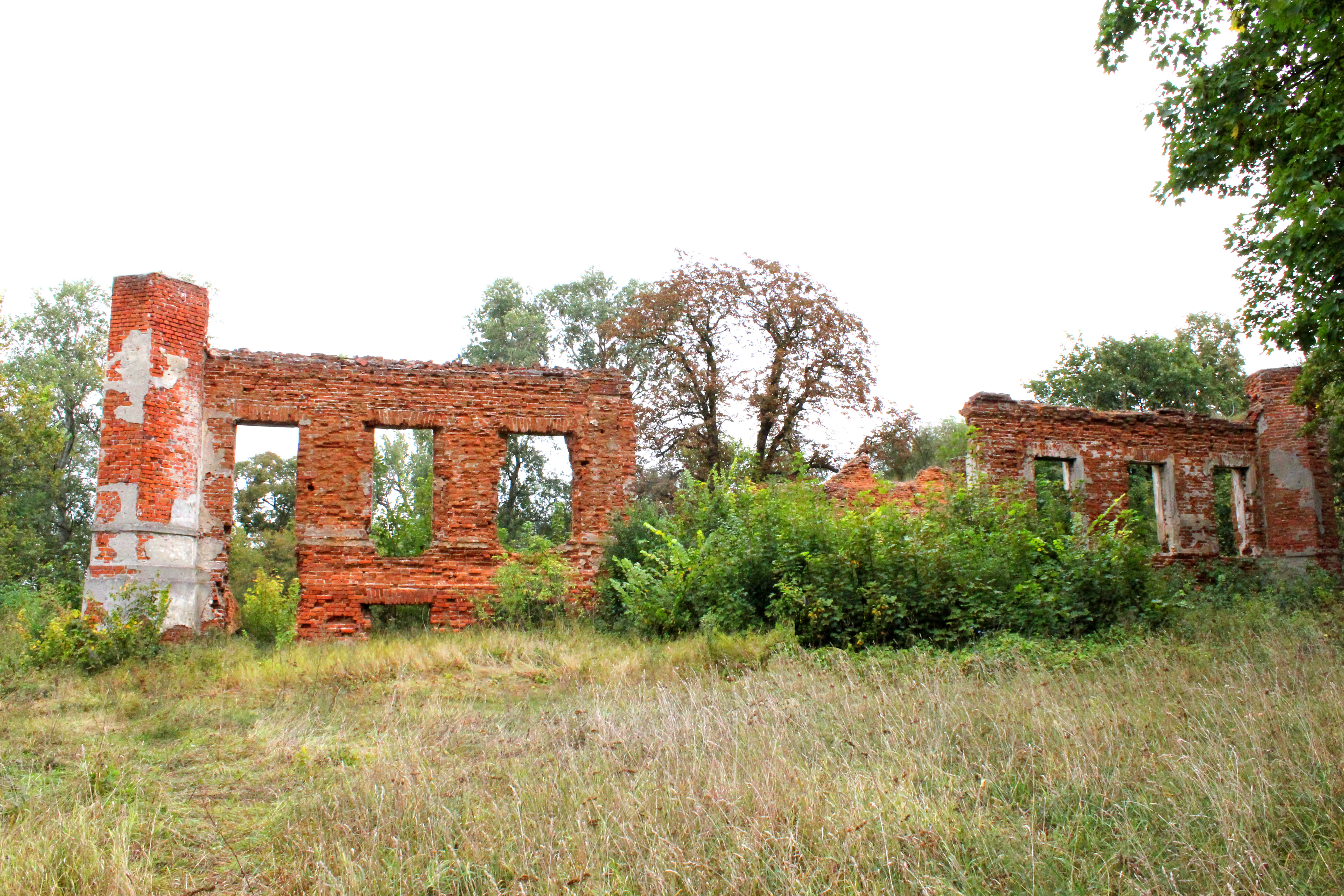 Kościelna Wieś - zespół dworski: dwór (ruina), XVIII/XIX